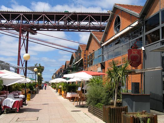 Docas de Lisboa & Ponte 25 de Abril. Lisboa (Lisbon), Portugal.